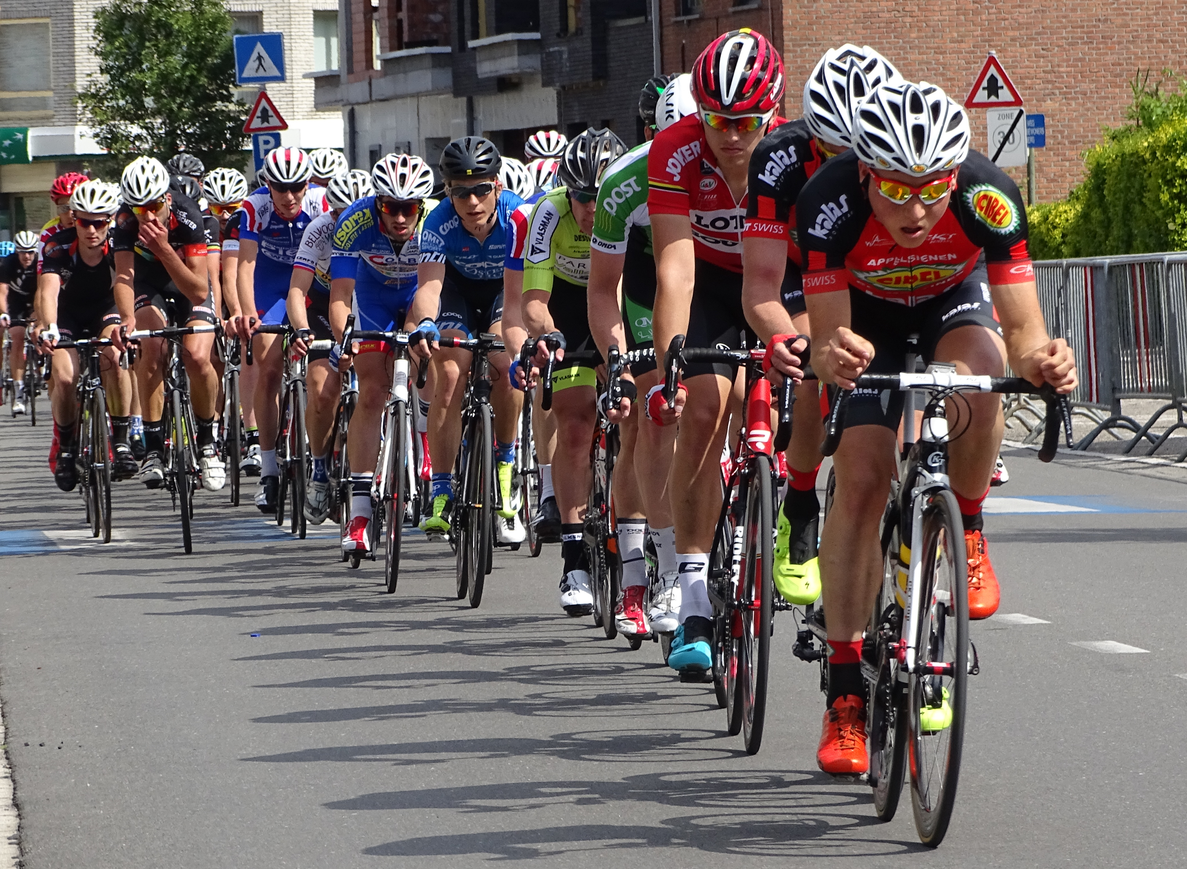 Reportage réalisé le dimanche 7 juin à l'occasion de l'arrivée du Mémorial Philippe Van Coningsloo 2015 à Bonheiden, Belgique.